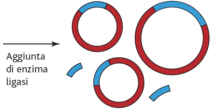 processo di inserimento